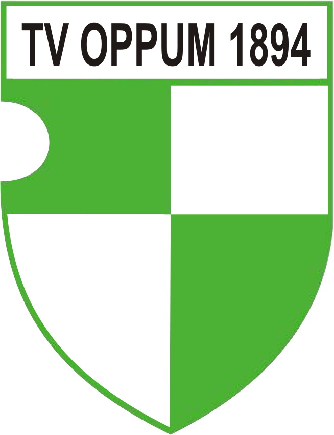 Vereinslogo TV Krefeld-Oppum 1894 e.V.